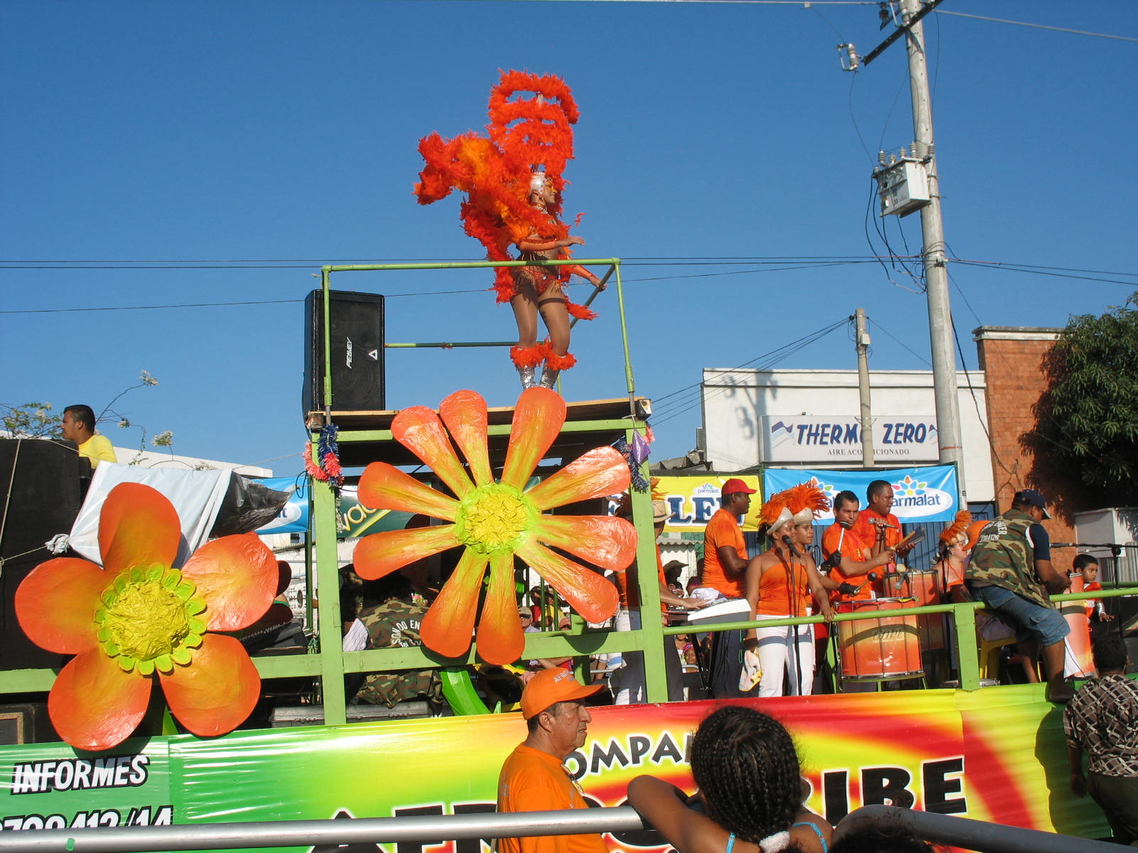 Carroza en el Carnaval de Barranquilla